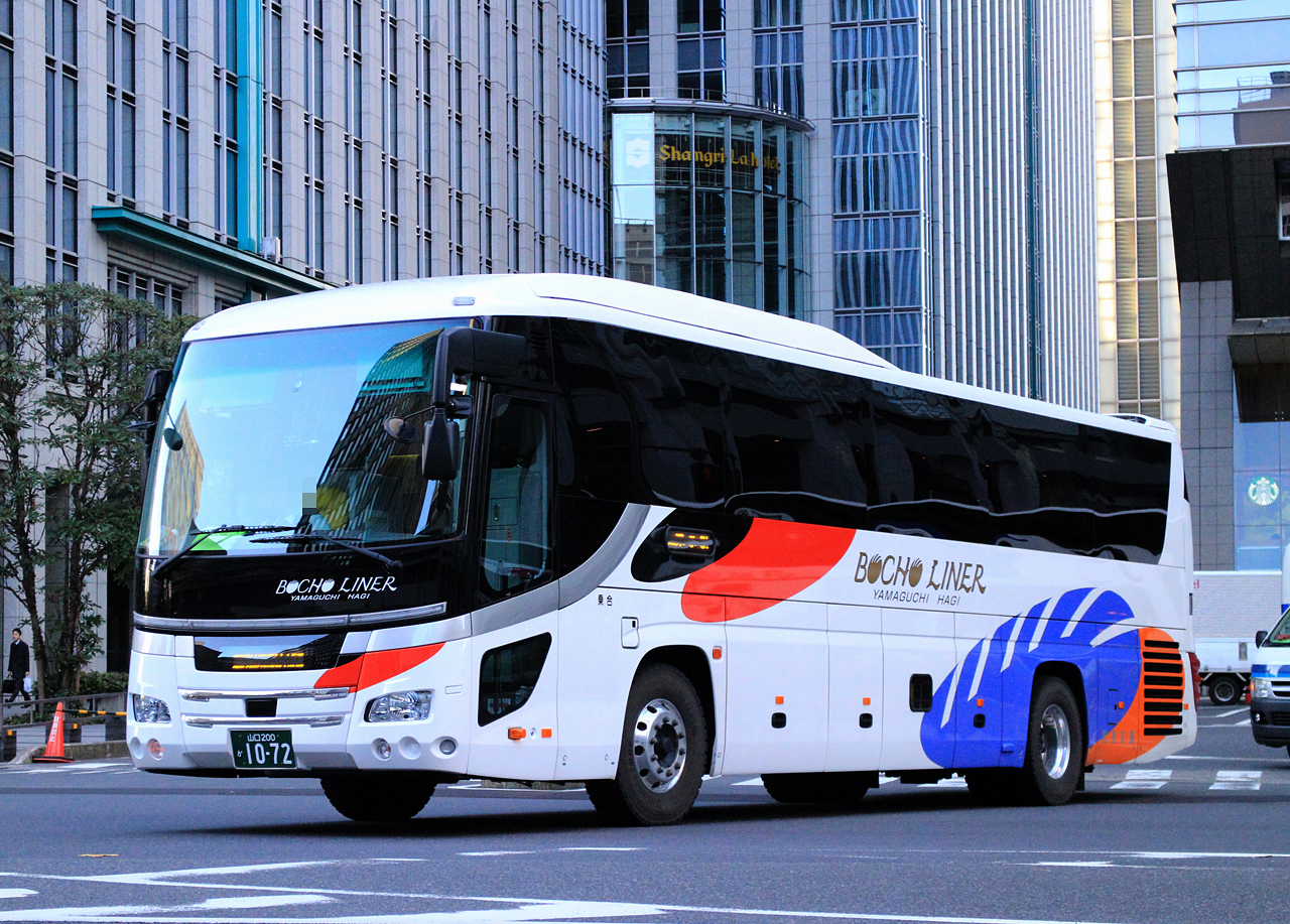 登録番号 山口200か10-72 防長交通㈱萩営業所所属 夜行高速路線用車両 2016年12月30日 東京駅日本橋口にて撮影 撮影者 Zondag2000